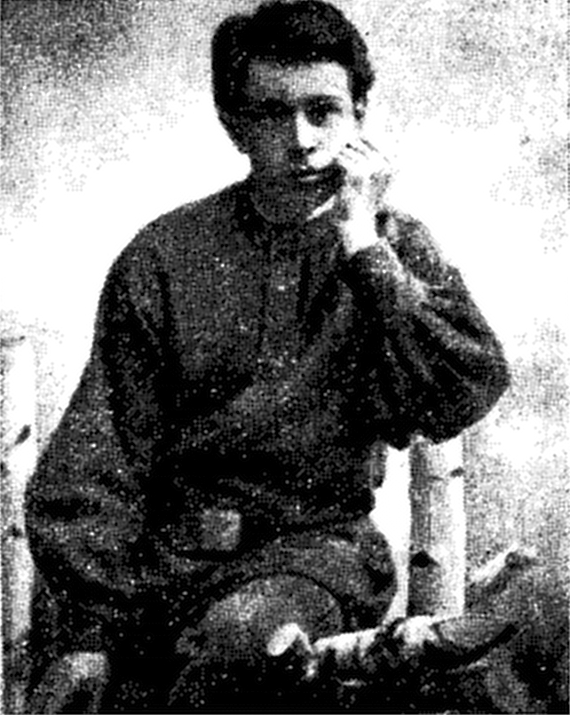 Черепанов Сергей Александрович во время учебы в училище